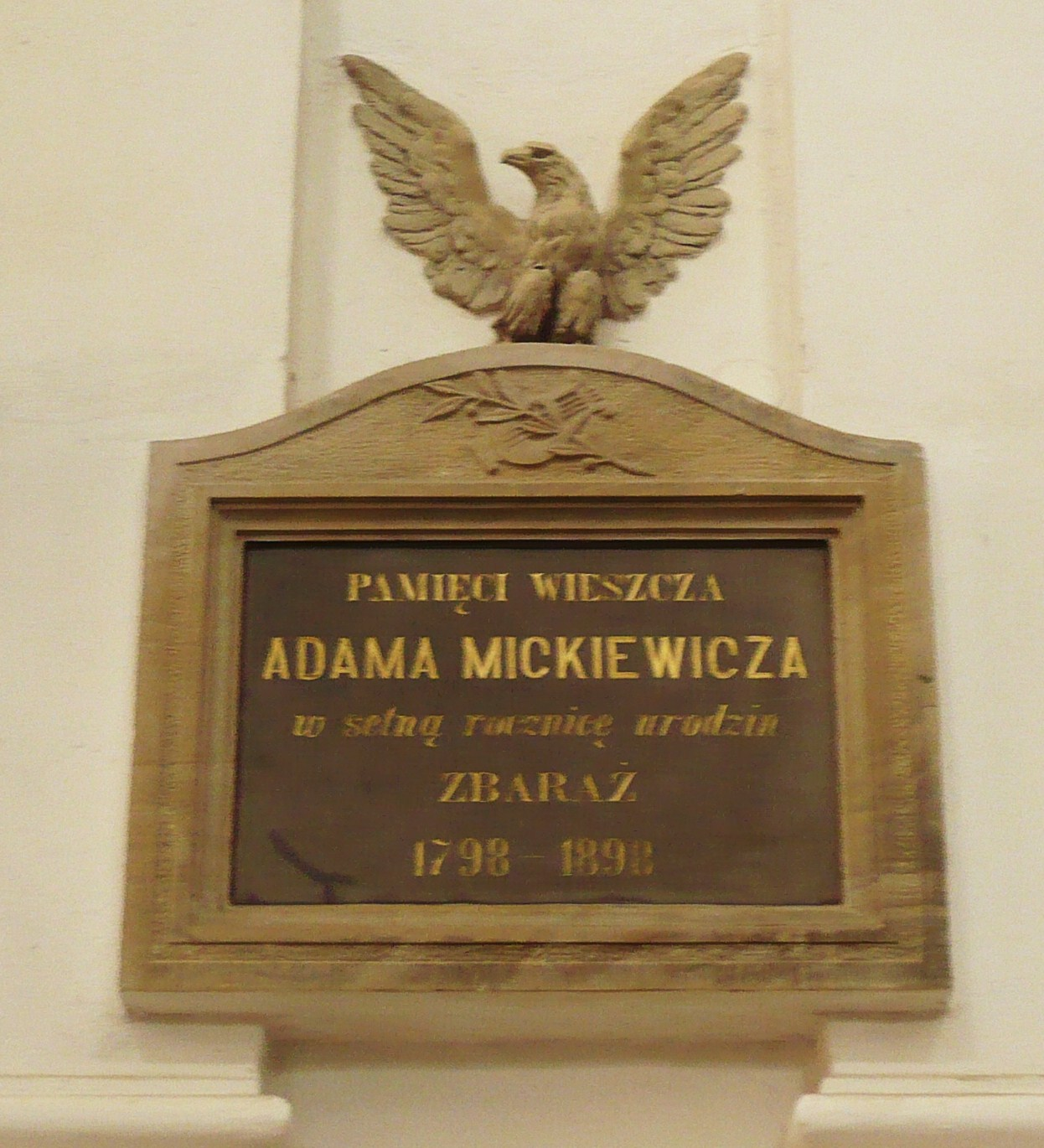 Zbaraż, kościół oo. bernardynów